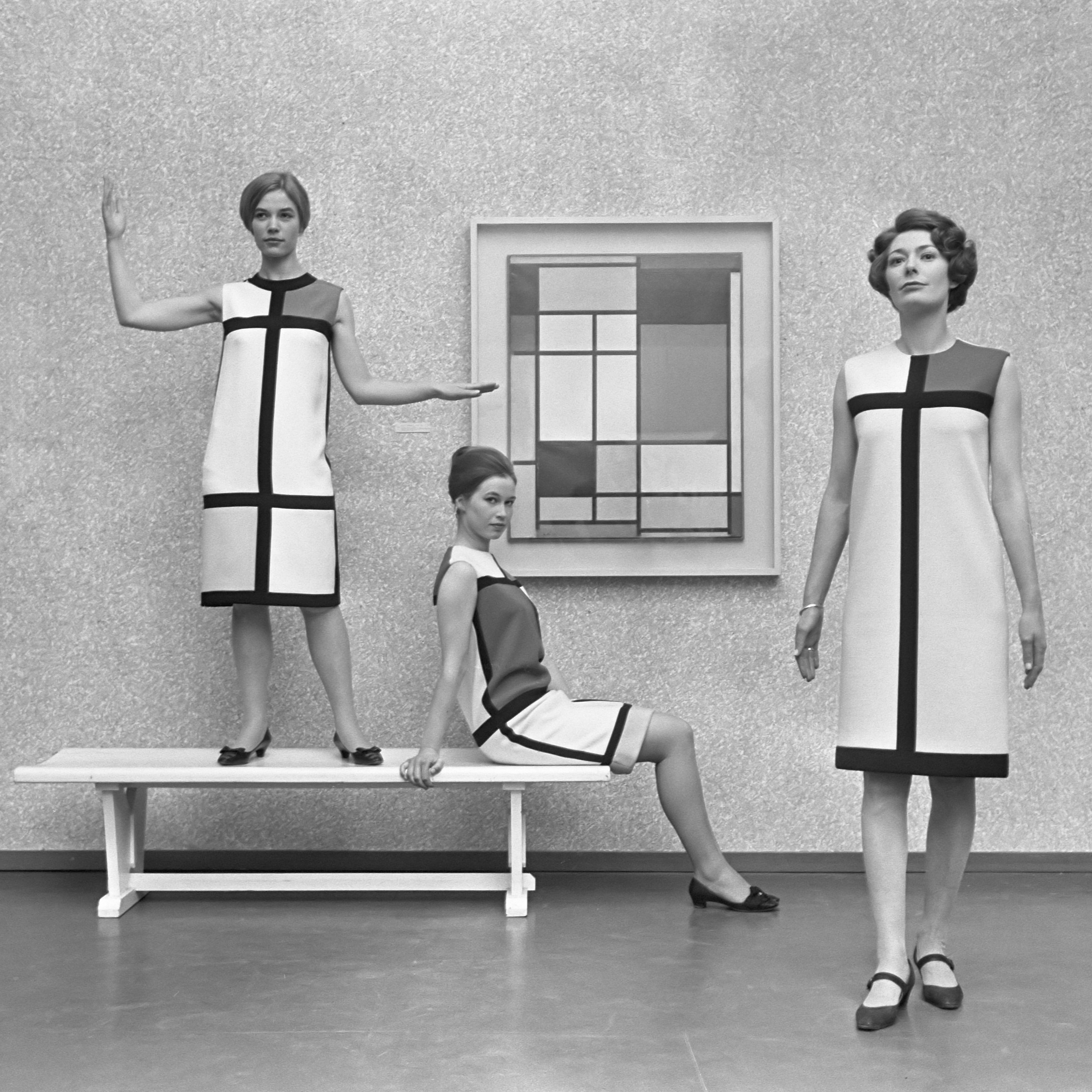 Mondriaanmode uit Parijs, japonnen gemaakt door Yves St. Laurent , de modellen in Haagse Gemeente Museum 12 januari 1966